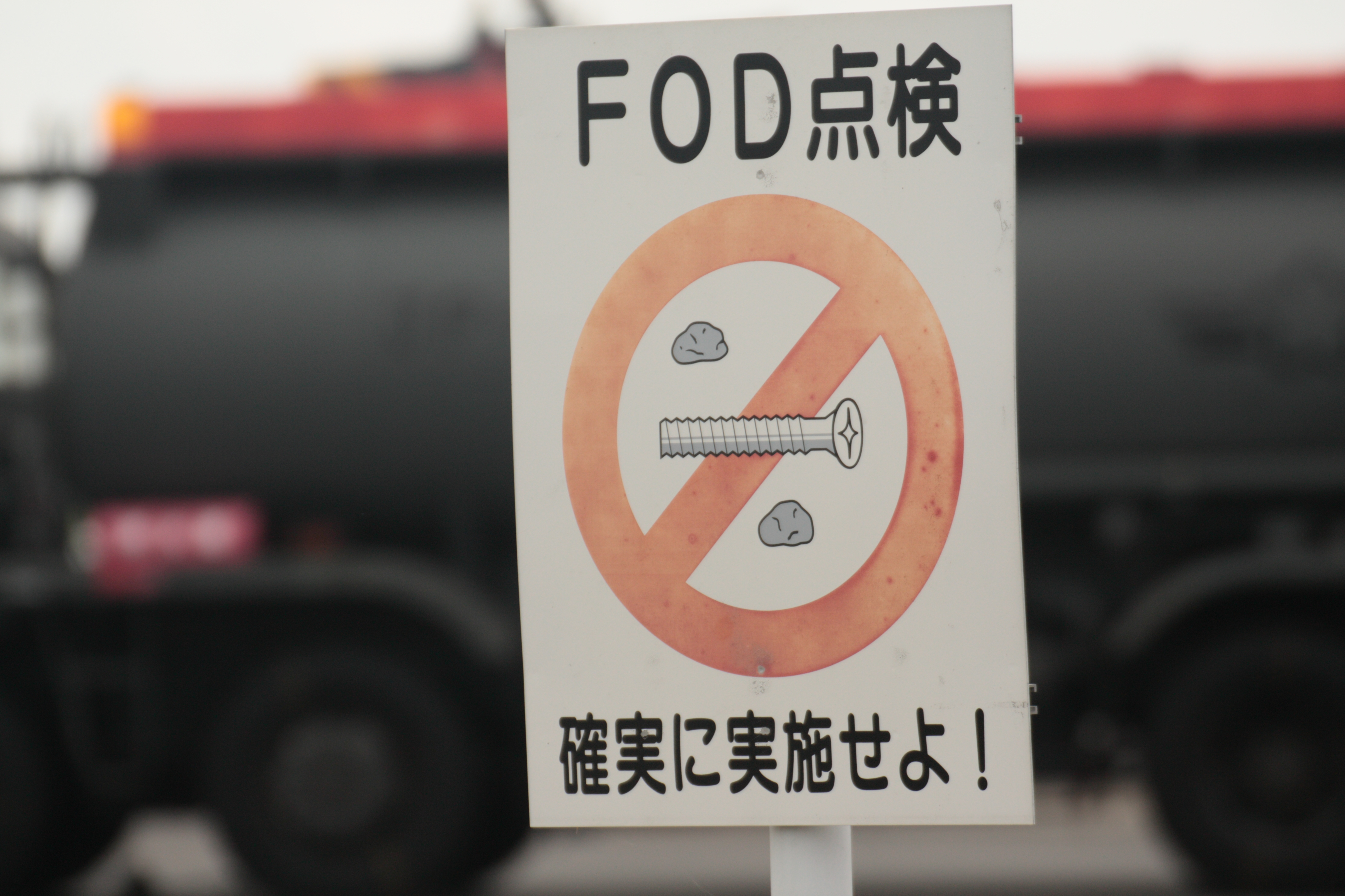 千歳航空祭